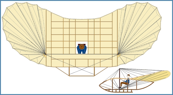 Etrich Wels Glider 1906